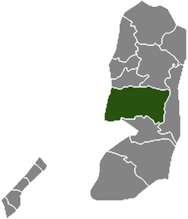 Palestine governorate Ramallah El-Beireh